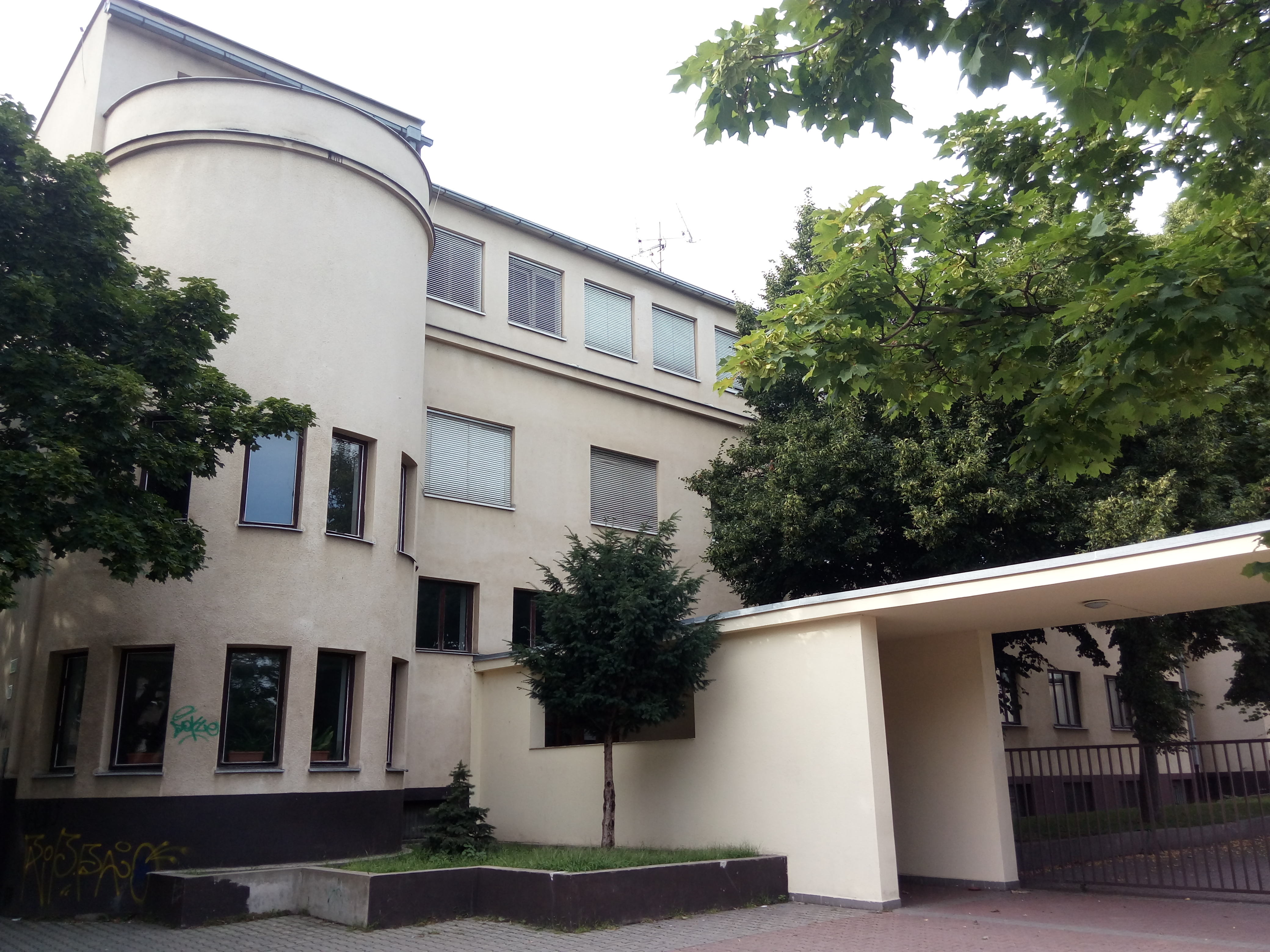 Saleziáni, Záhradnícka, Miletičova, Ružinov, Bratislava